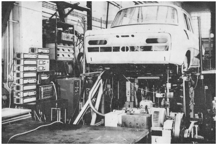 Programová kmitací zkouška karoserie Š 100 na hydropulsním pětiválci